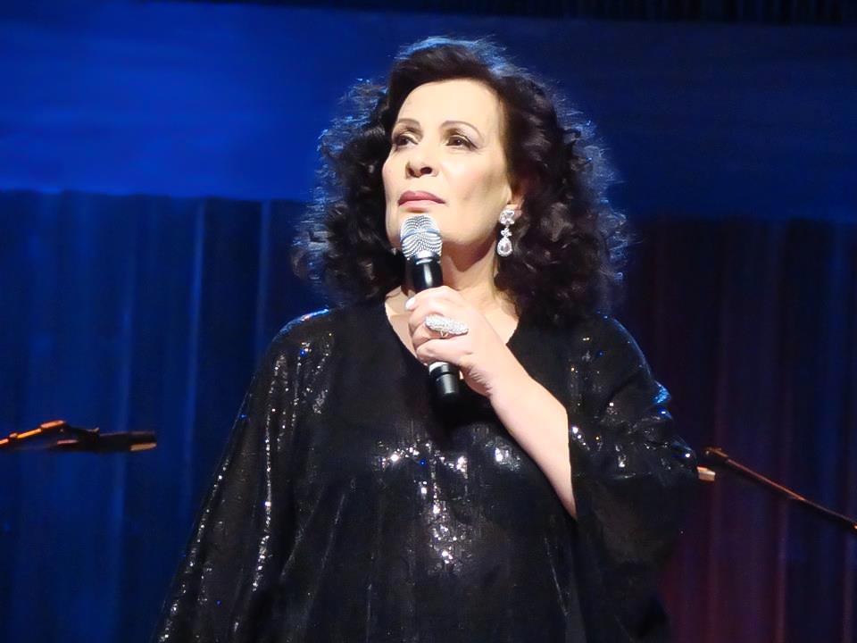 RADOJKA ŠVERKO 2011